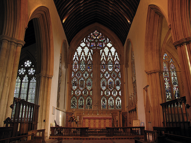 Interior: Dorchester Abbey